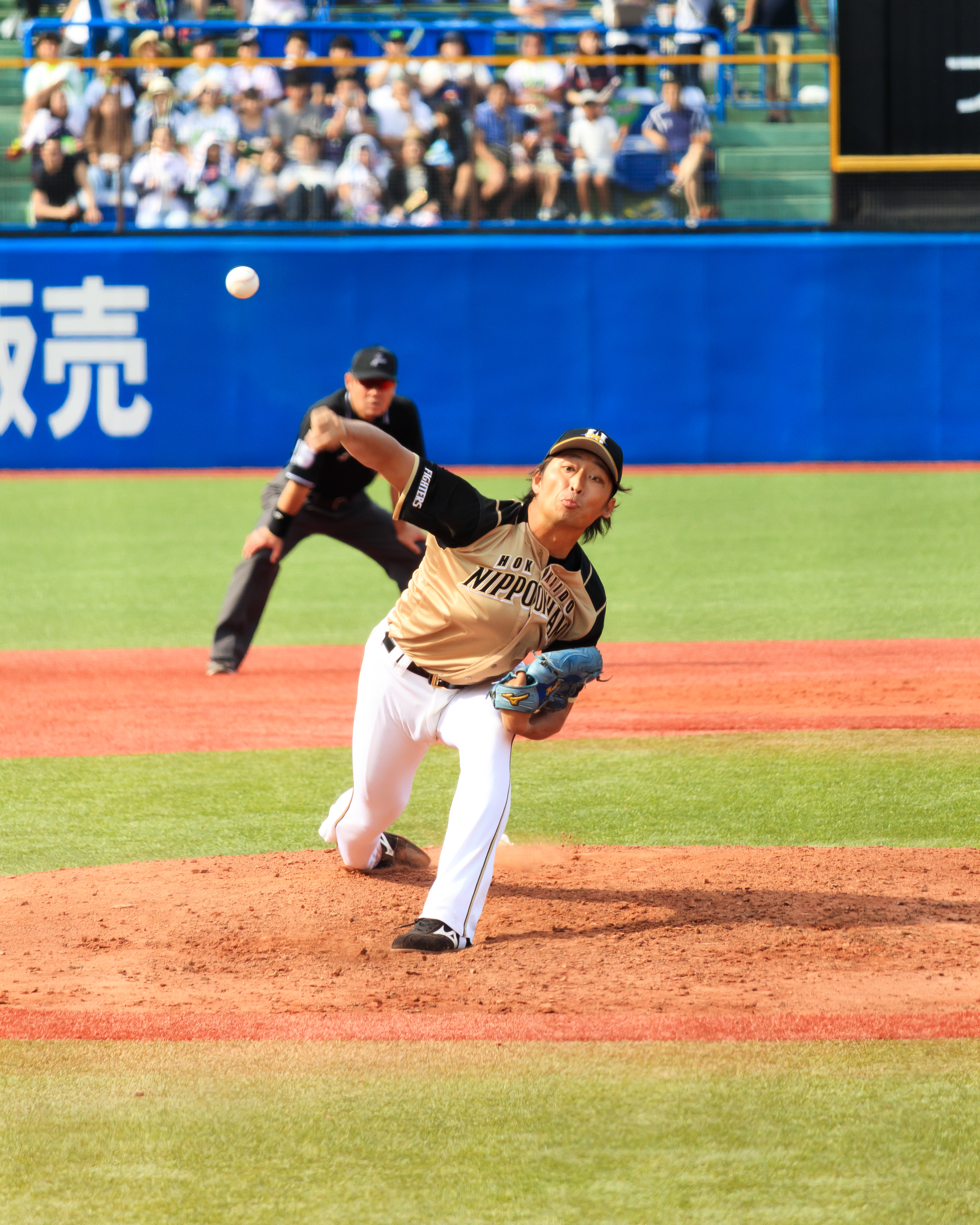 白村の力投。